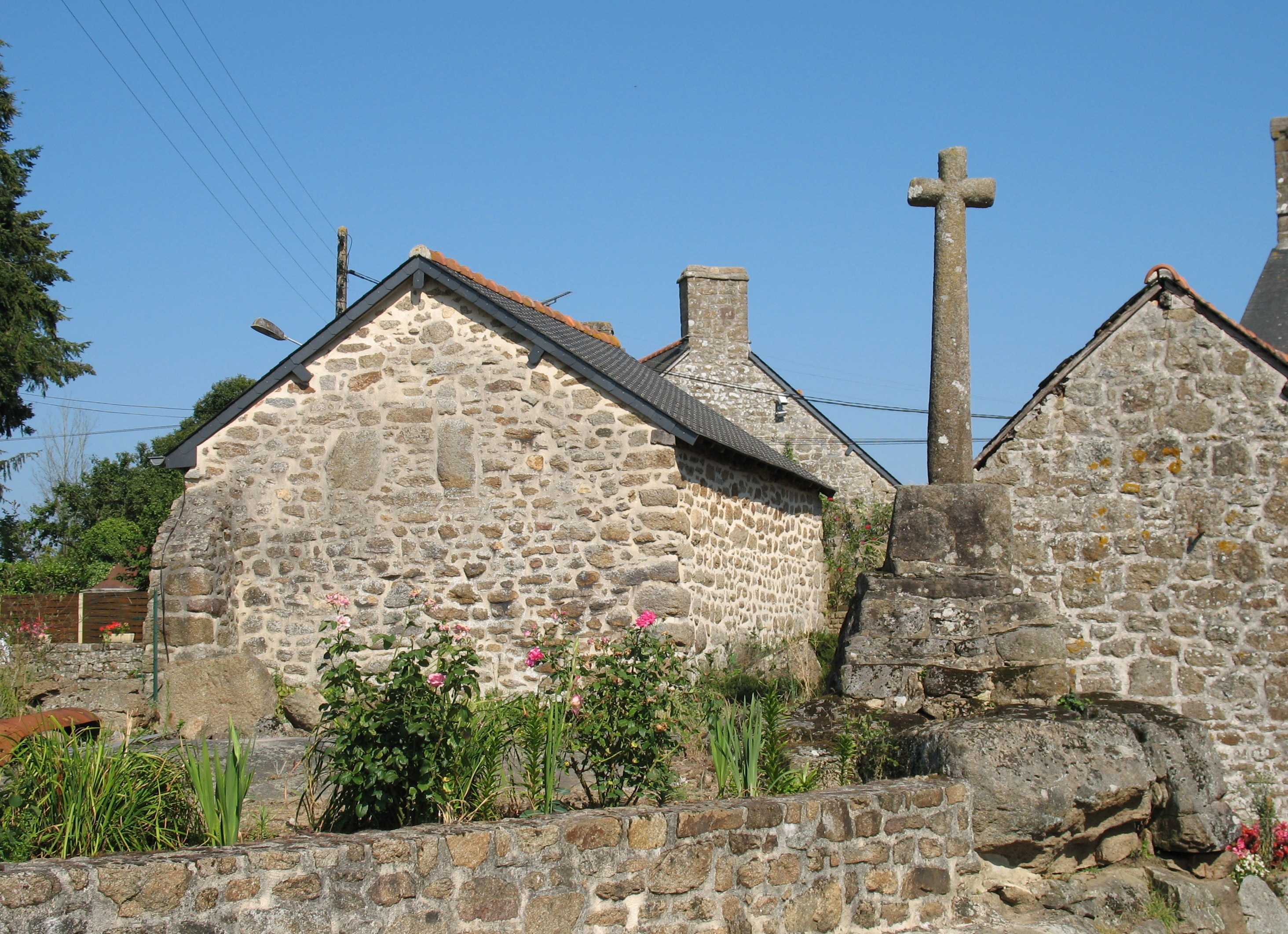 Croix en granite située dans le bourg de Saint-Christophe-de-Valains.